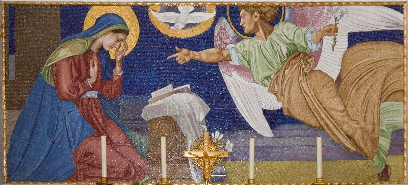 Steinhof Kirche Linker seitenaltar